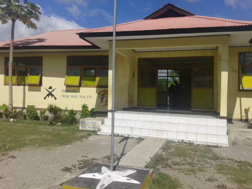 Posto de Fronteira de Citrana, Suco Beneufe